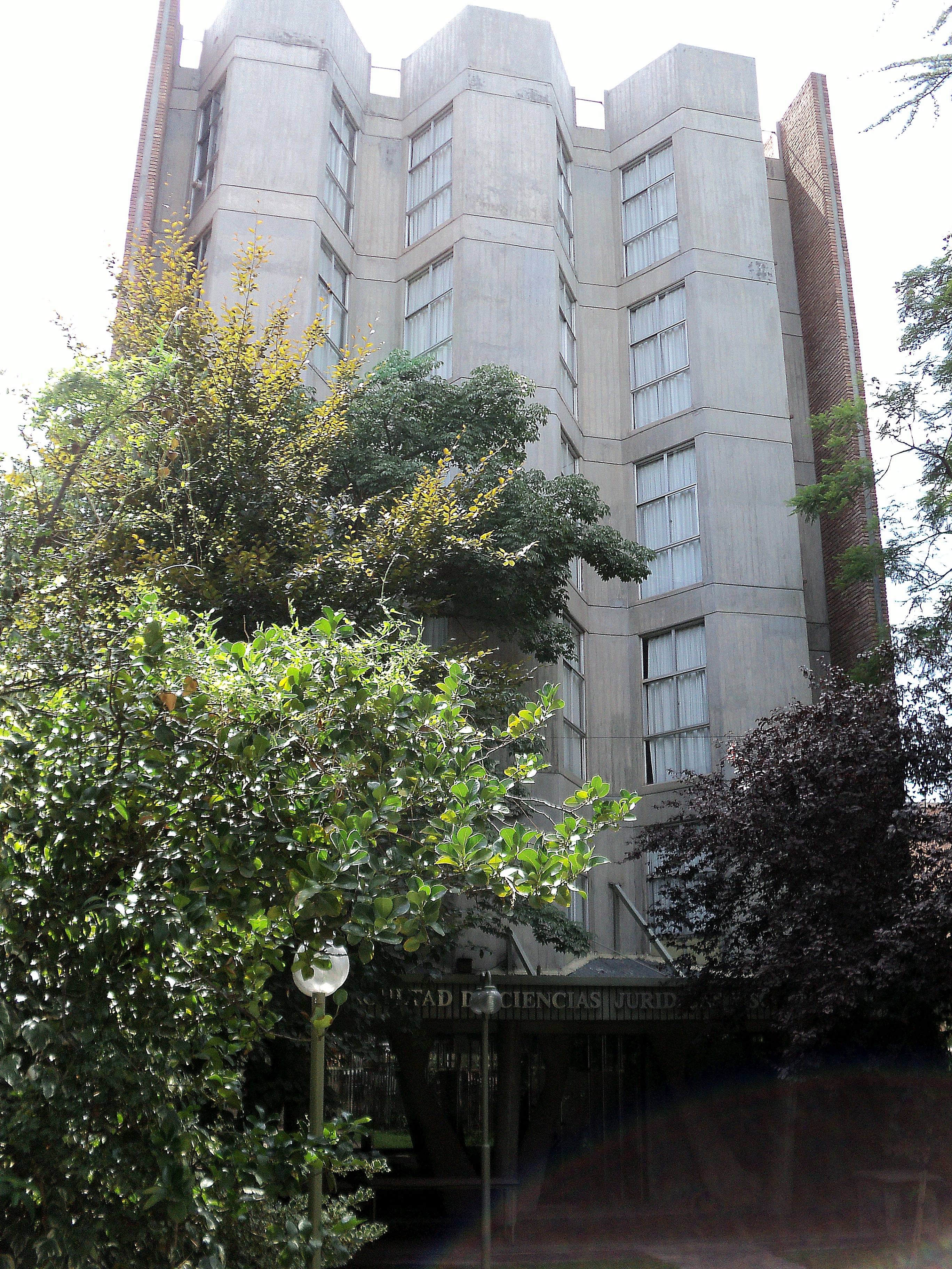 División de la facultad de derecho de la Universidad de Mendoza